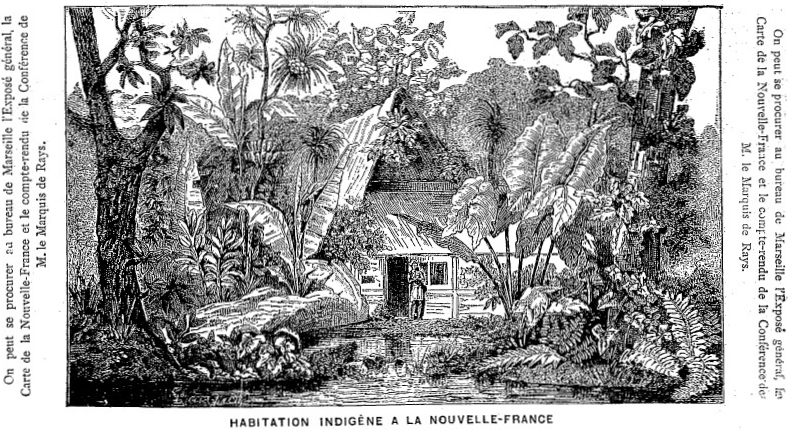 Dessin représentant une habitation indigène dans la colonie de la Nouvelle France en Nouvelle-Guinée publié par Charles du Breil du Rays dans son journal "La Nouvelle France" (n° du 15 juillet 1879).